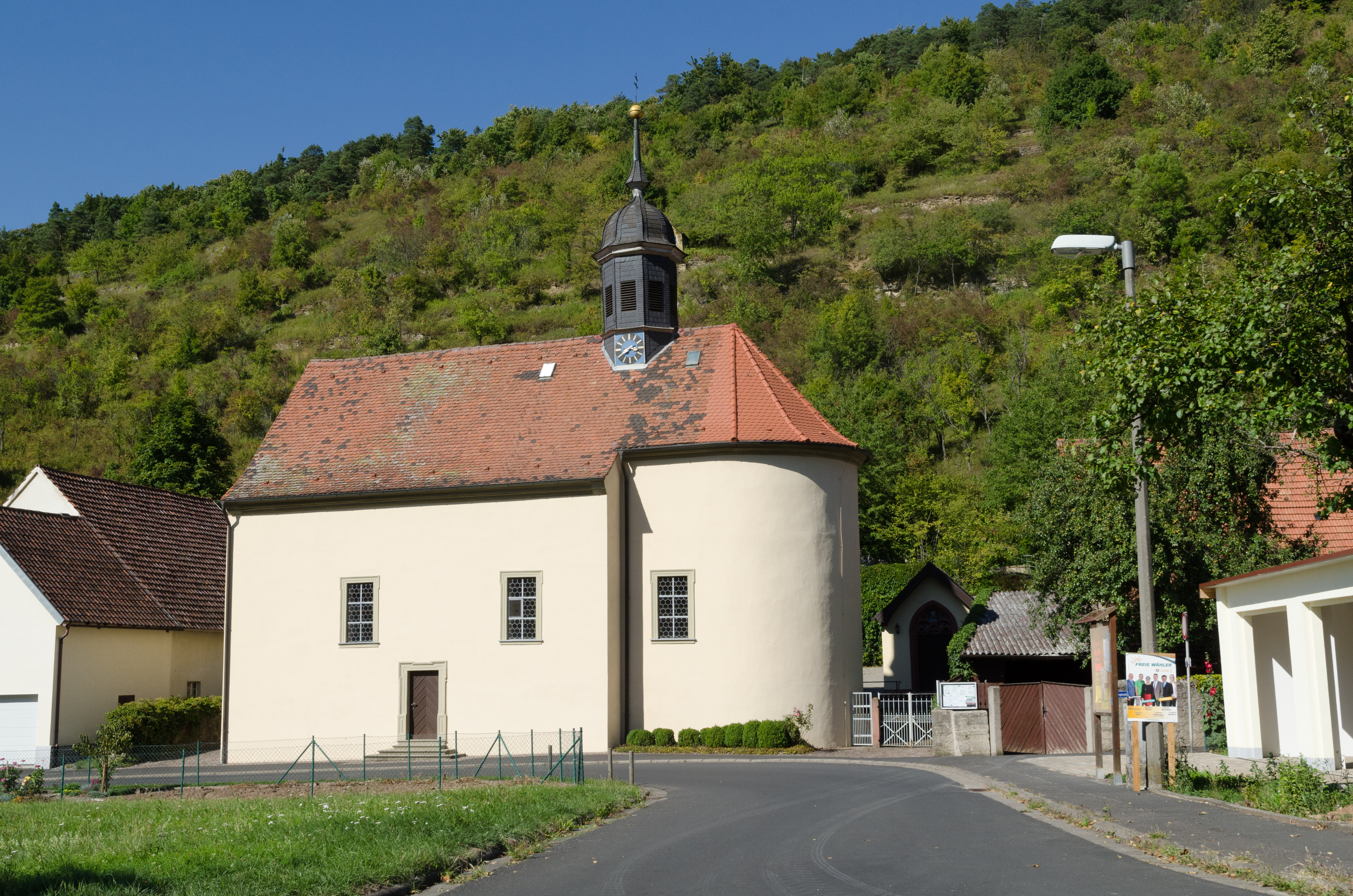 Engenthal, Katholische Filialkirche St. Valentin